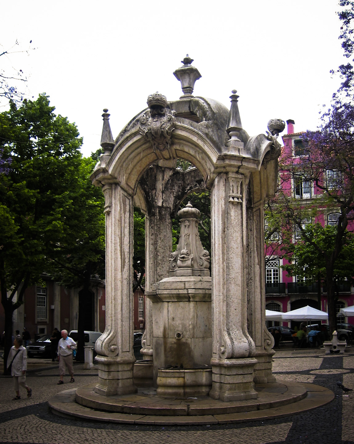 Chafariz do Carmo, Largo do Carmo, Lisboa, Portugal